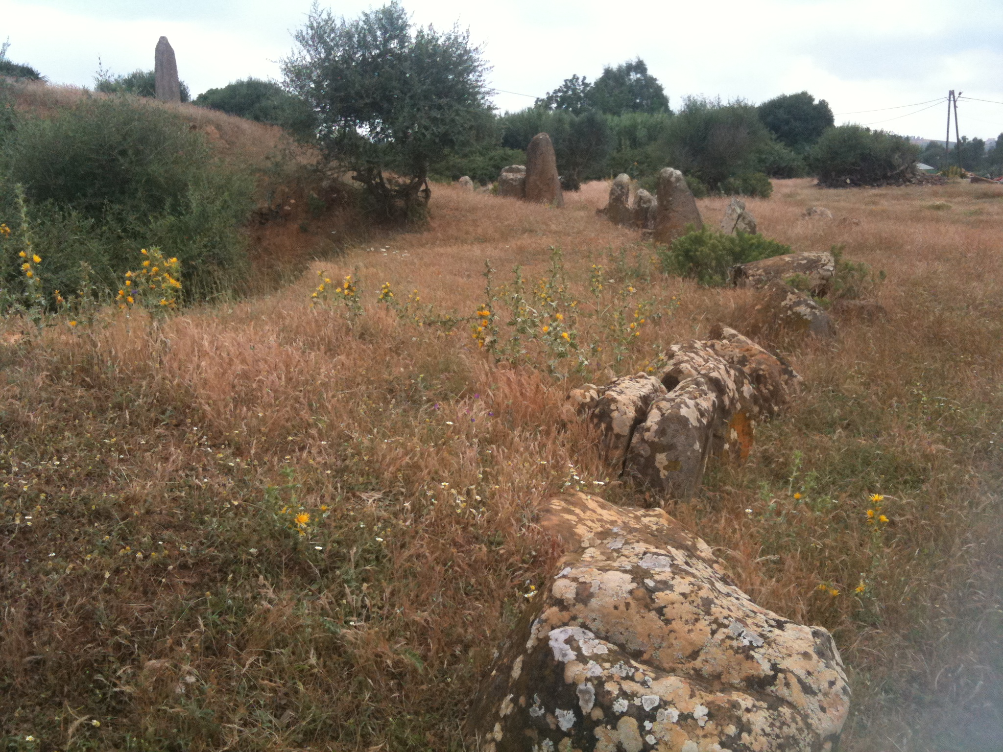 Conjunto megalítico de Mezora